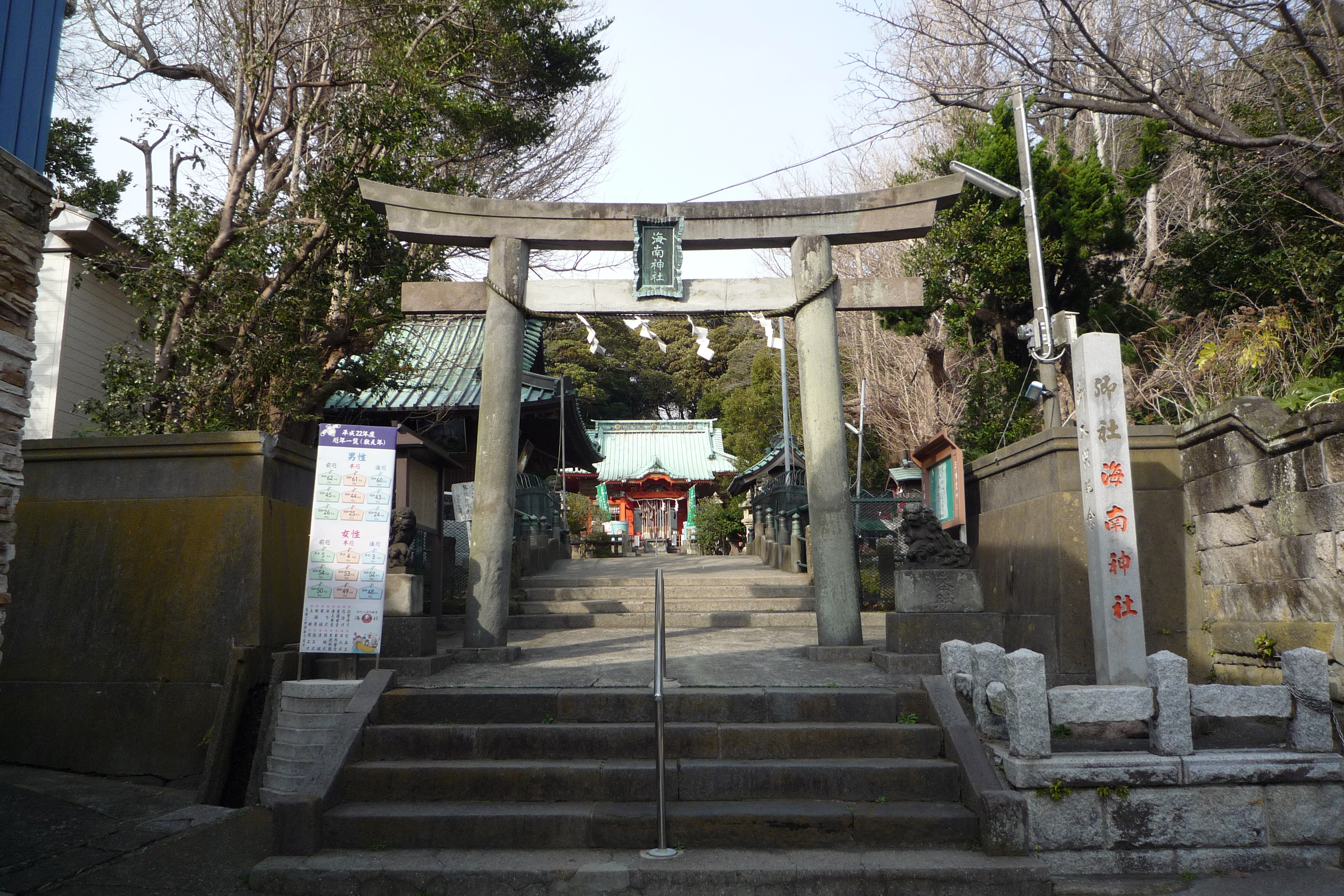 海南神社 鳥居前から撮影。